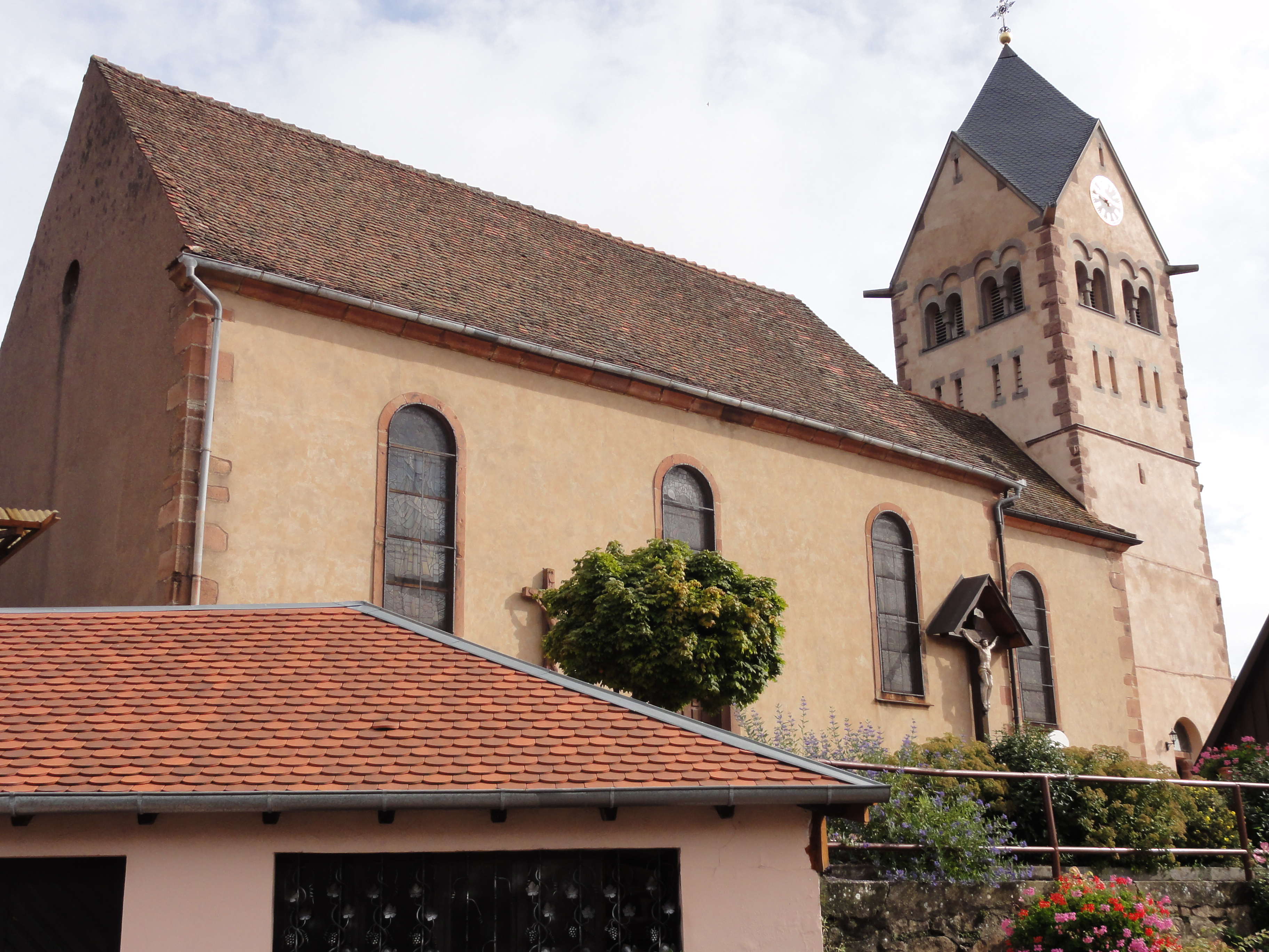 Alsace, Bas-Rhin, Église Saint-Rémi d'Itterswiller (PA00084756, IA00115366).